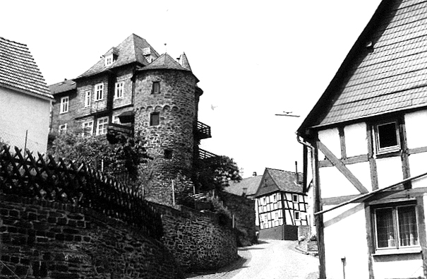 Freusburg